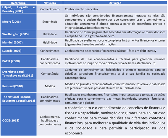 Diferentes definições na literatura sobre o que é letramento financeiro